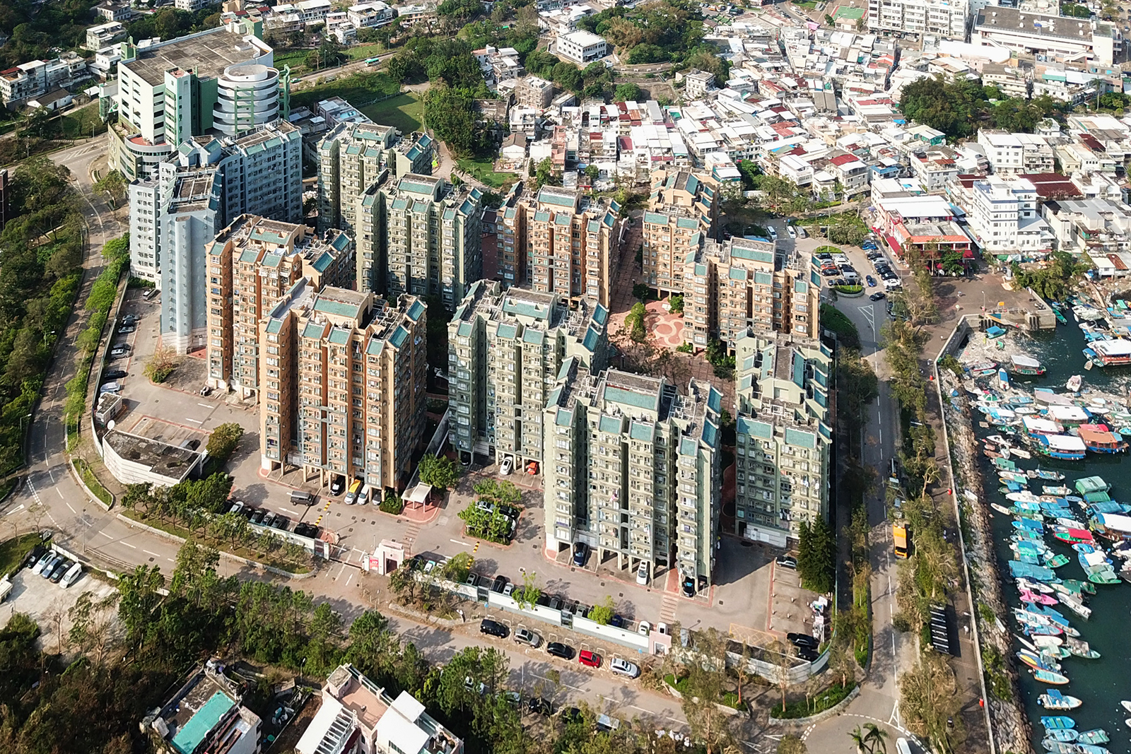 Lakeside Garden